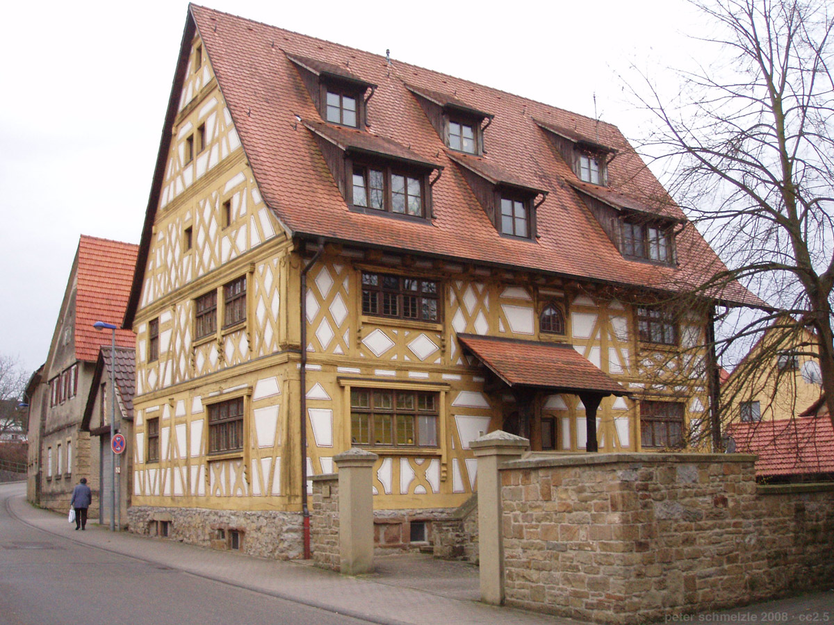 Alte Kaserne in Sinsheim-Steinsfurt, Lerchennest-Straße 8 (siehe Erwin Huxhold: Die Fachwerkhäuser im Kraichgau. Ein Führer zu den Baudenkmälern. Hrsg. vom Heimatverein Kraichgau, 3. ergänzte Auflage, Ubstadt-Weiher 2002, S. 242, ISBN 3-89735-185-4)